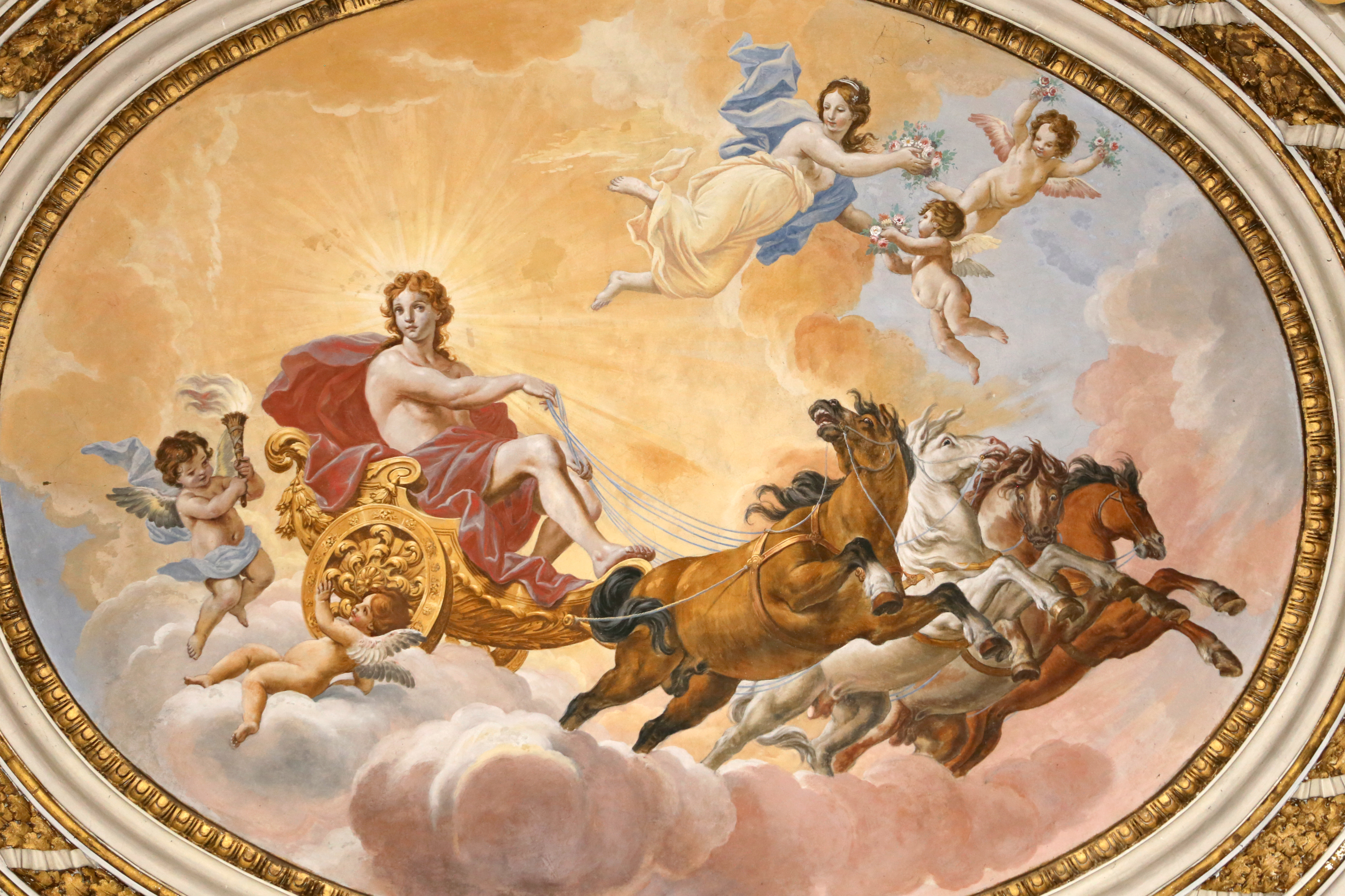 Villa Rospigliosi This is a photo of a monument which is part of cultural heritage of Italy.